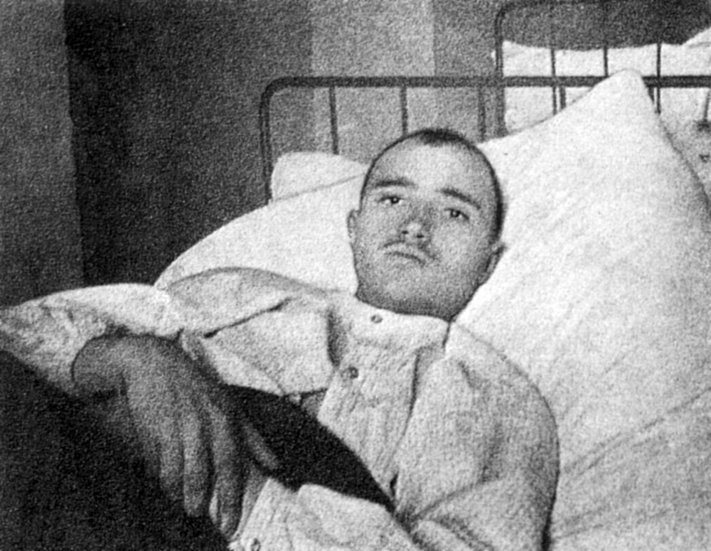 Беларуская (тарашкевіца): Максім Гарэцкі ў вайсковым шпіталі, 1914 г.